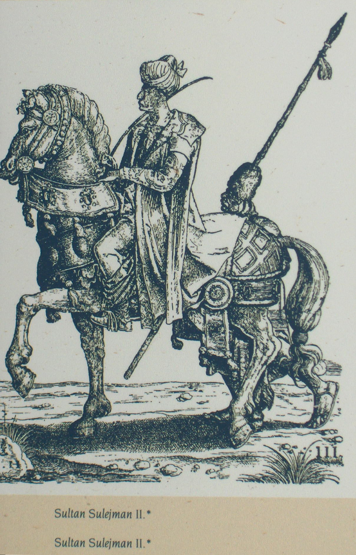 Sultan Suleiman II (1642-1691); Trsat Castle, Rijeka, Croatia